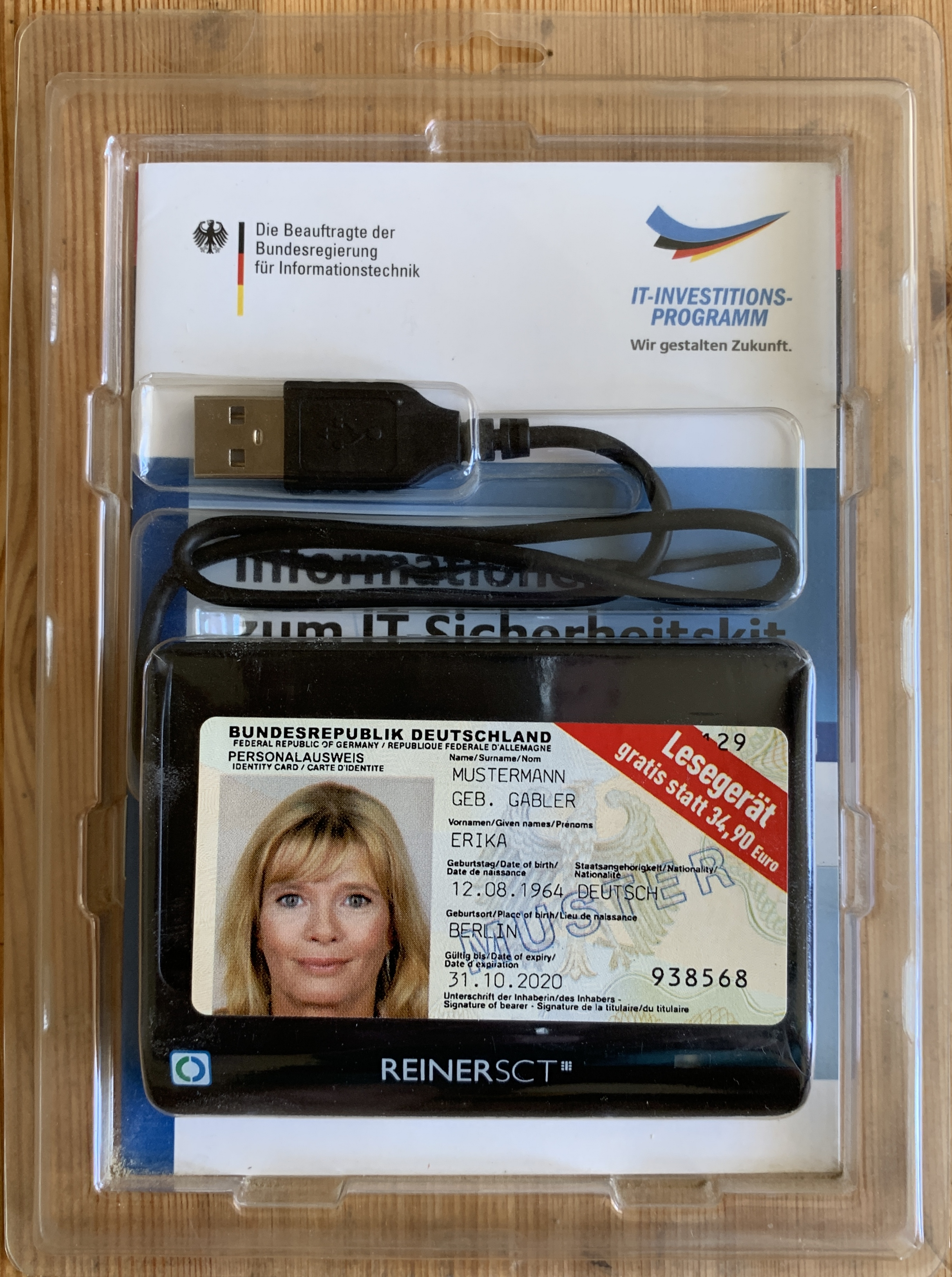 Lesegerät für deutschen Personalausweis